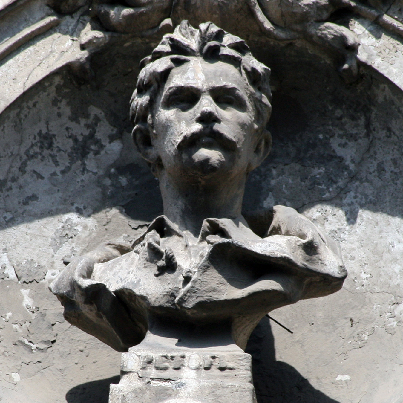 Busta Petöfi Sándora vo výklenku obytného domu na bratislavských Palisádoch